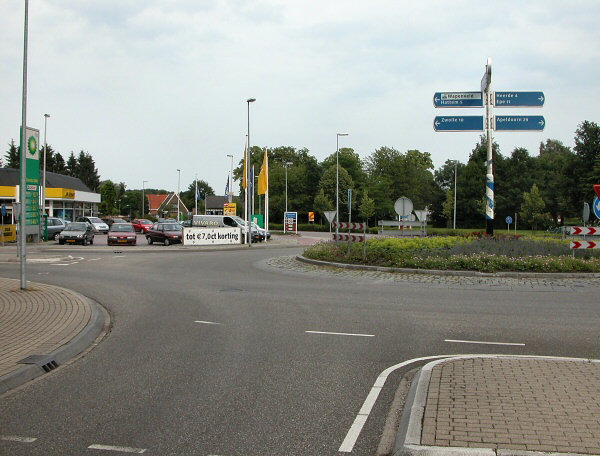 Rotonde Wapenveld